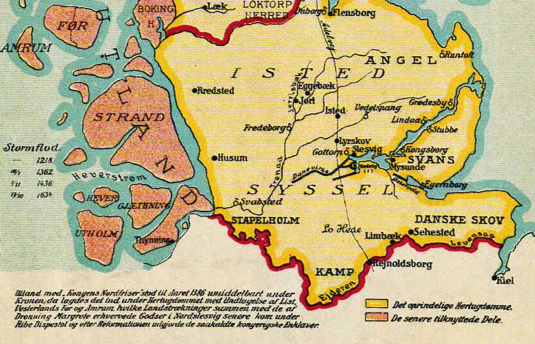 Detail fra Gustav Rosendal - Sønderjylland i middelalderen, fra 1913